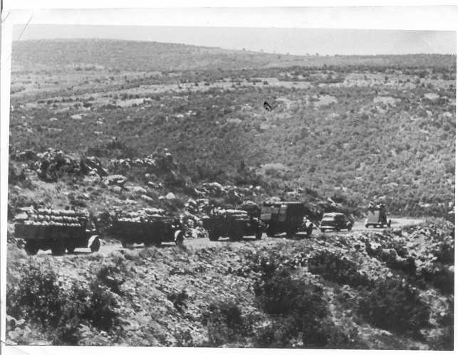 הקמת גדר הצפון